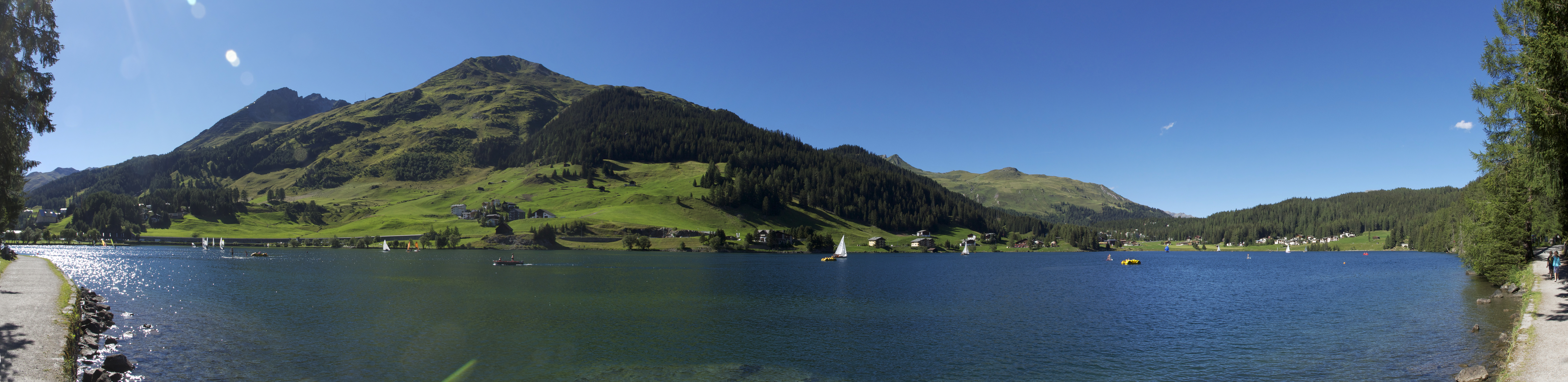 Der Davosersee, Ansicht vom Ostufer